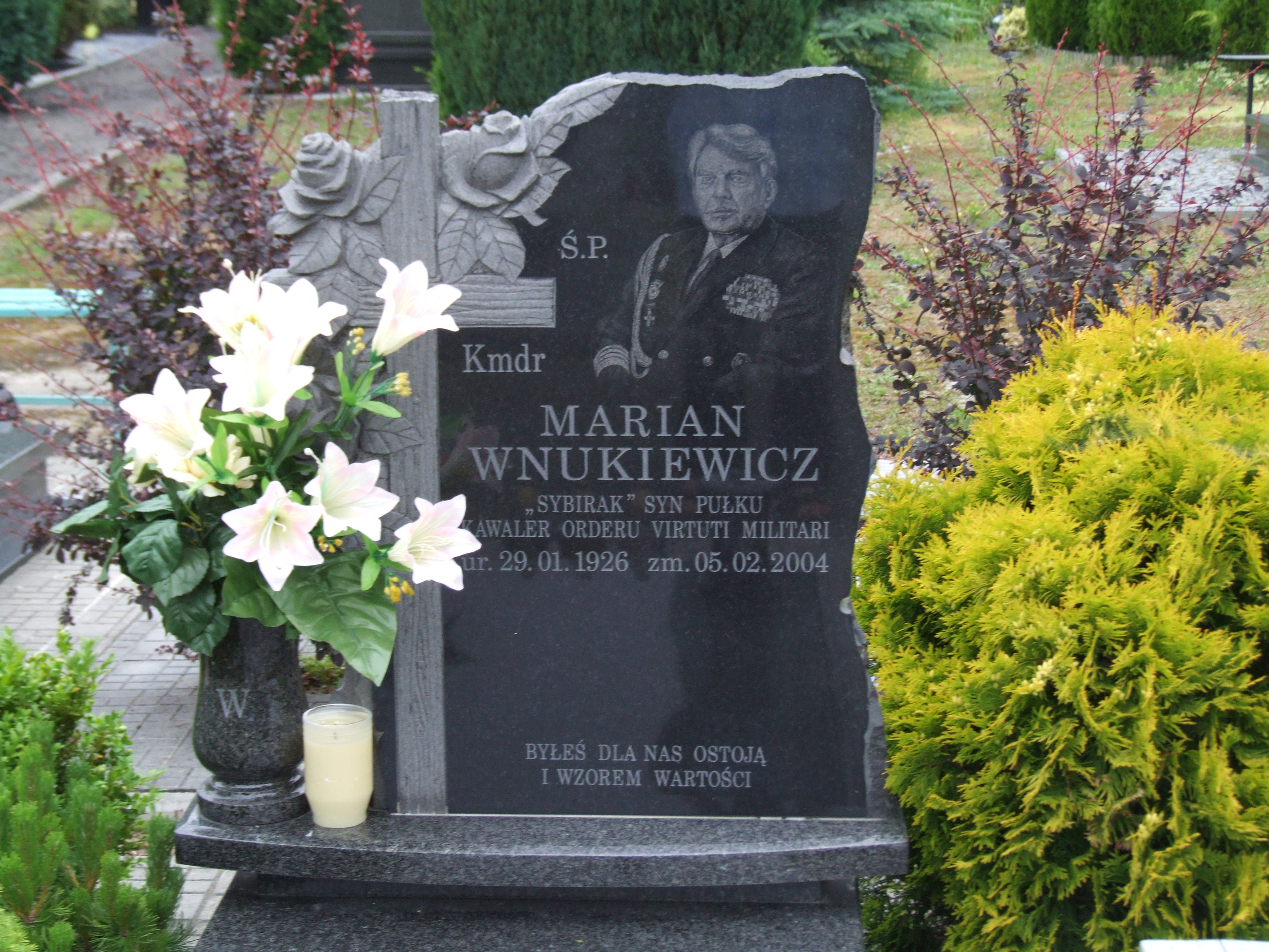 Gdynia-Oksywie Cmentarz Marynarki Wojennej